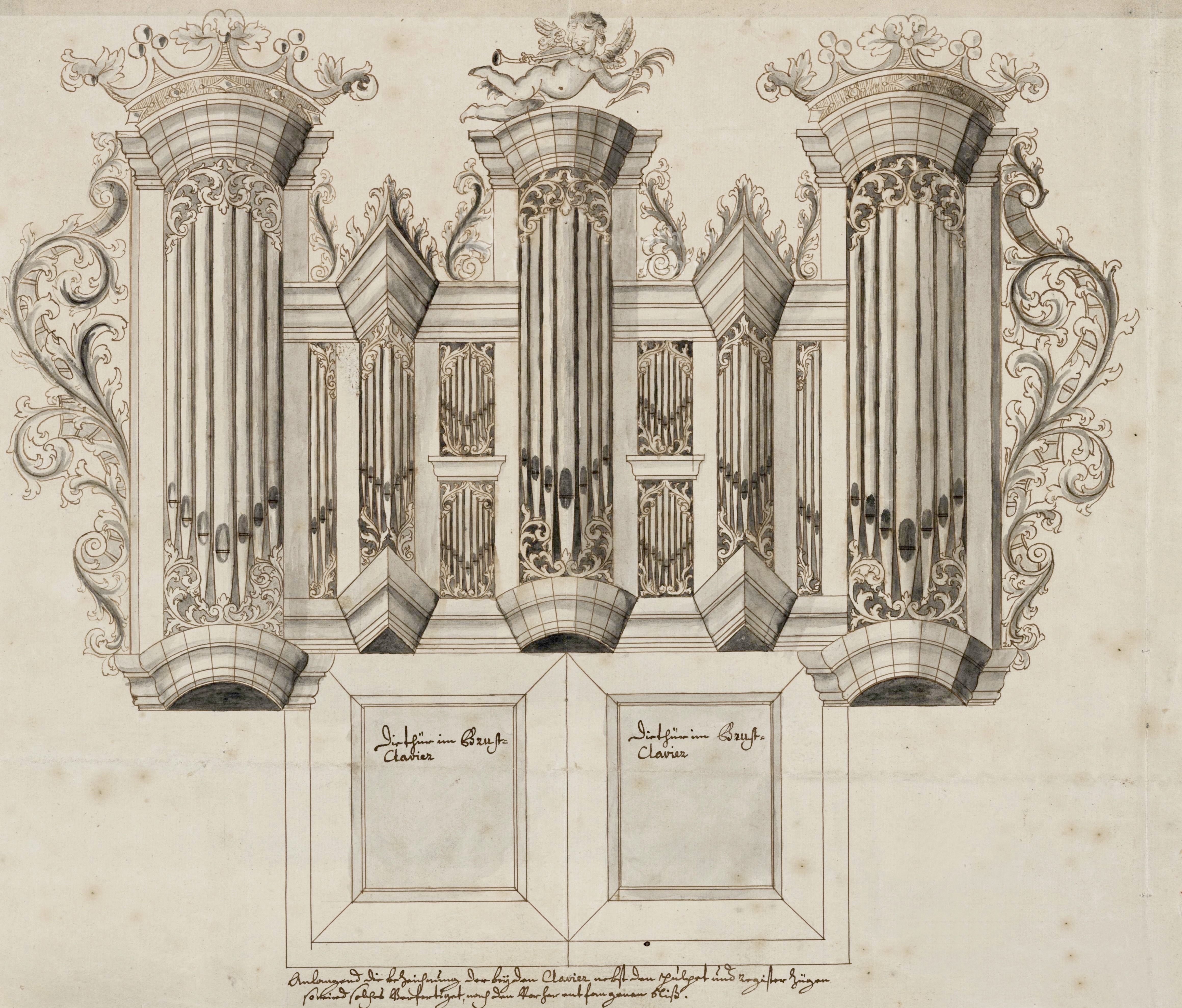 Die Orgel zu Bremervörde, 1728, Papier, 38,5 x 37,8 cm. Niedersächsisches Landesarchiv